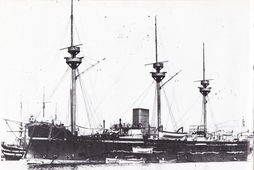 French ironclad Richelieu.